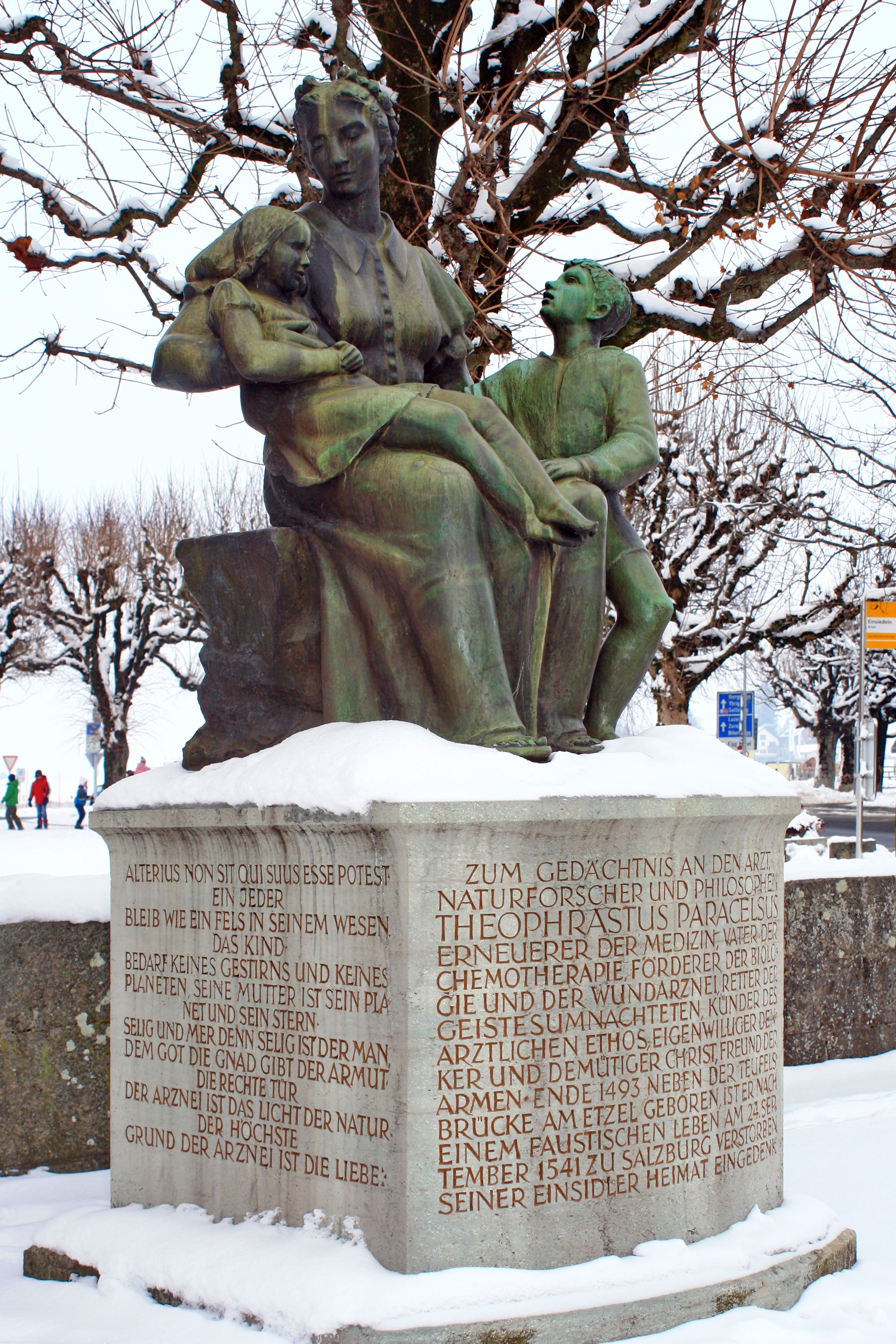 Memorial to Paracelsus in Paracelsus-Park, in Einsiedeln (Switzerland), erected in 1941 on the occasion of the 400th anniversary of Paracelsus' death, on the initiative of art historian Linus Birchler, first president of the Swiss Paracelsus Society. The sculpture shows an "Einsiedeln woman with two healthy children" (Einsiedler Frau mit zwei gesunden Kindern) as a symbol of "motherly health". Inscription: front: Zum Gedächtnis an den Arzt, Naturforscher und Philosophen Theophrastus Paracelsus Erneuerer der Medizin, Vater der Chemotherapie, Förderer der Biologie und der Wundarznei, Retter der Geistesumnachteten, Künder des arztlichen Ethos, eigenwilliger Denker und demütiger Christ, Freund der Armen. Ende 1493 neben der Teufelsbrücke am Etzel geboren, ist er nach einem faustischen Leben am 24. September 1541 zu Salzburg verstorben seiner Einsidler Heimat eingedenk. left: Alterius non sit qui suus esse potest. Ein jeder bleib wie ein Fels in seinem Wesen. Das Kind bedarf keines Gestirns und keines Planeten, seine Mutter ist sein Planet und sein Stern. Selig und mer denn selig ist der Man, dem Got die Gnad gibt der Armut. Die rechte Tür der Arznei ist das Licht der Natur. Der höchste Grund der Arznei ist die Liebe. right: (not visible): Dass ich mich keiner Rhetorik noch subtilitatem berümen kann sondern nach der Zungen miner Gepurt und Landsprachen, ich bin von Ainsidlen des Lants ein Schweizer. Also bin ich gewandelt durch die Länder und ein peregri nus gewest meine Zeit, allein und fremd und anders. Da hast du, Got, wachsend lan deine Kunst unter dem Hauche des furchtbaren Wind- es mit Schmerzen in mir.